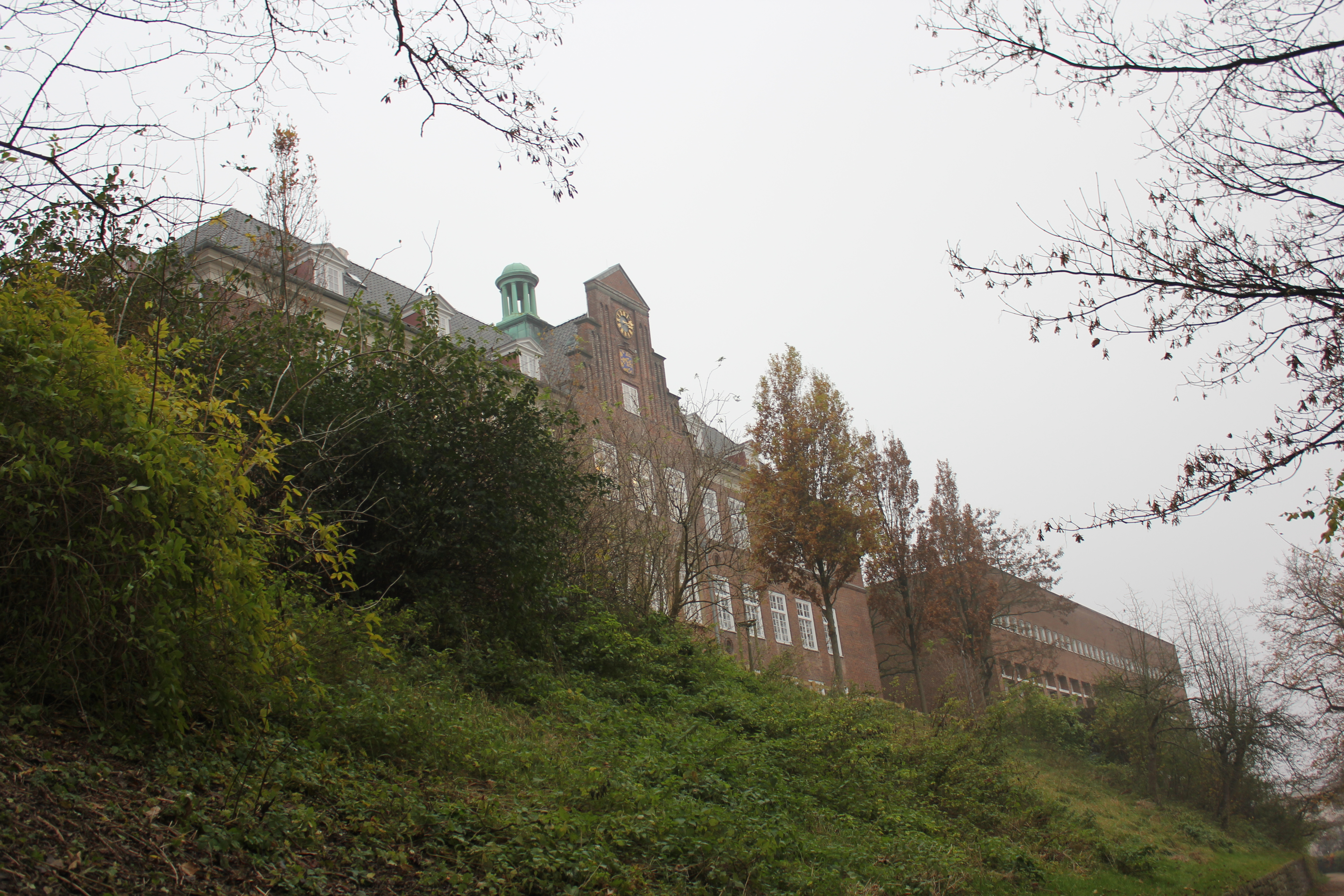 Die Duborg-Skolen in Flensburg (2011)